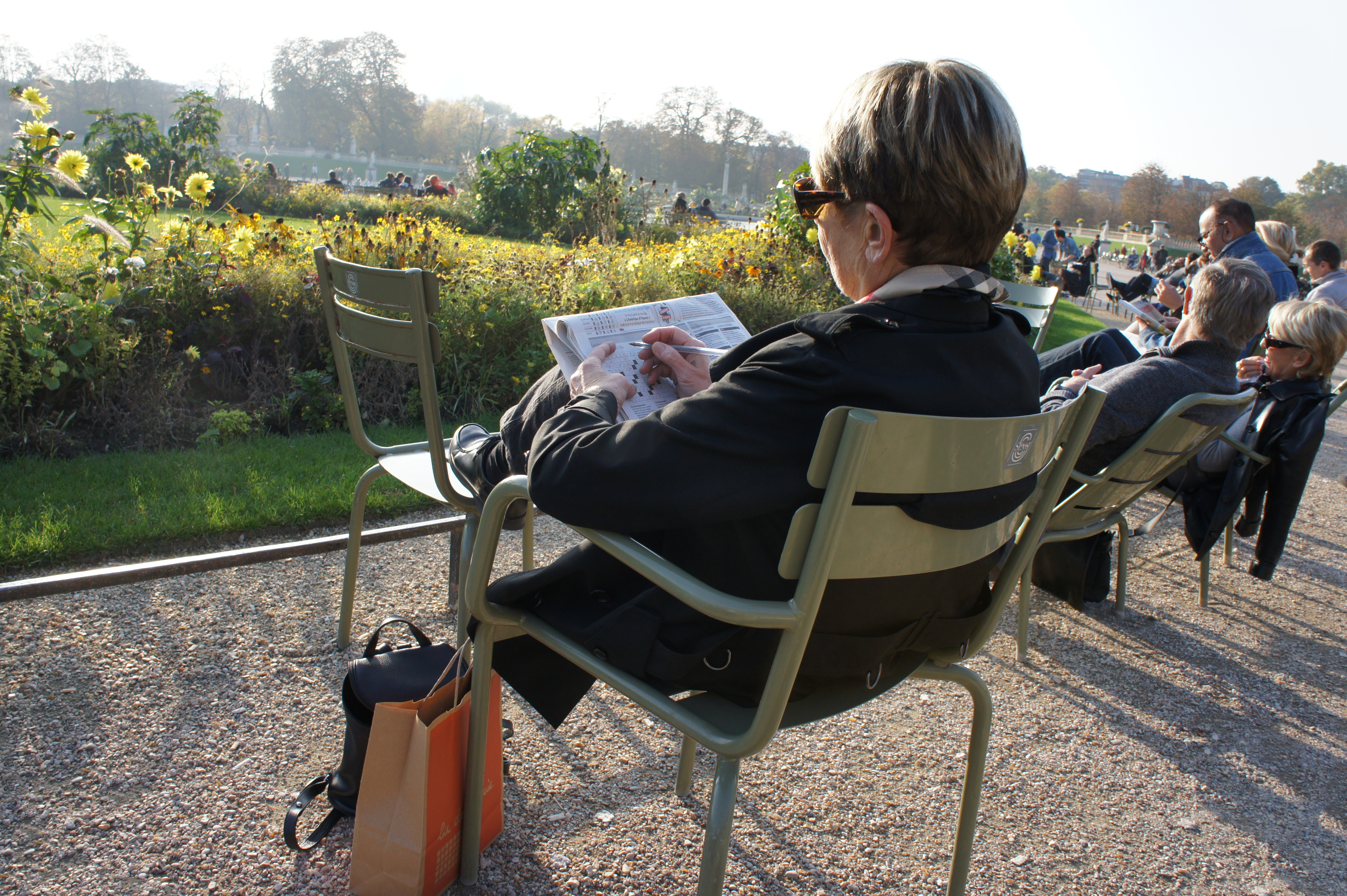 une Parisienne au Luxembourg